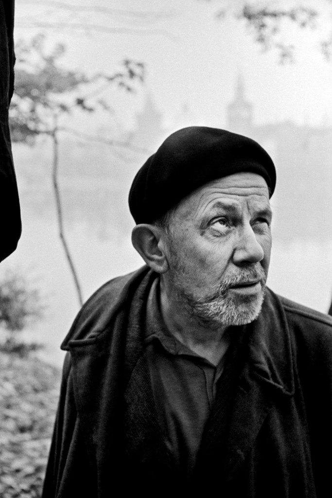 Miloň Novotný, Portrét Josefa Sudka, Praha 1958